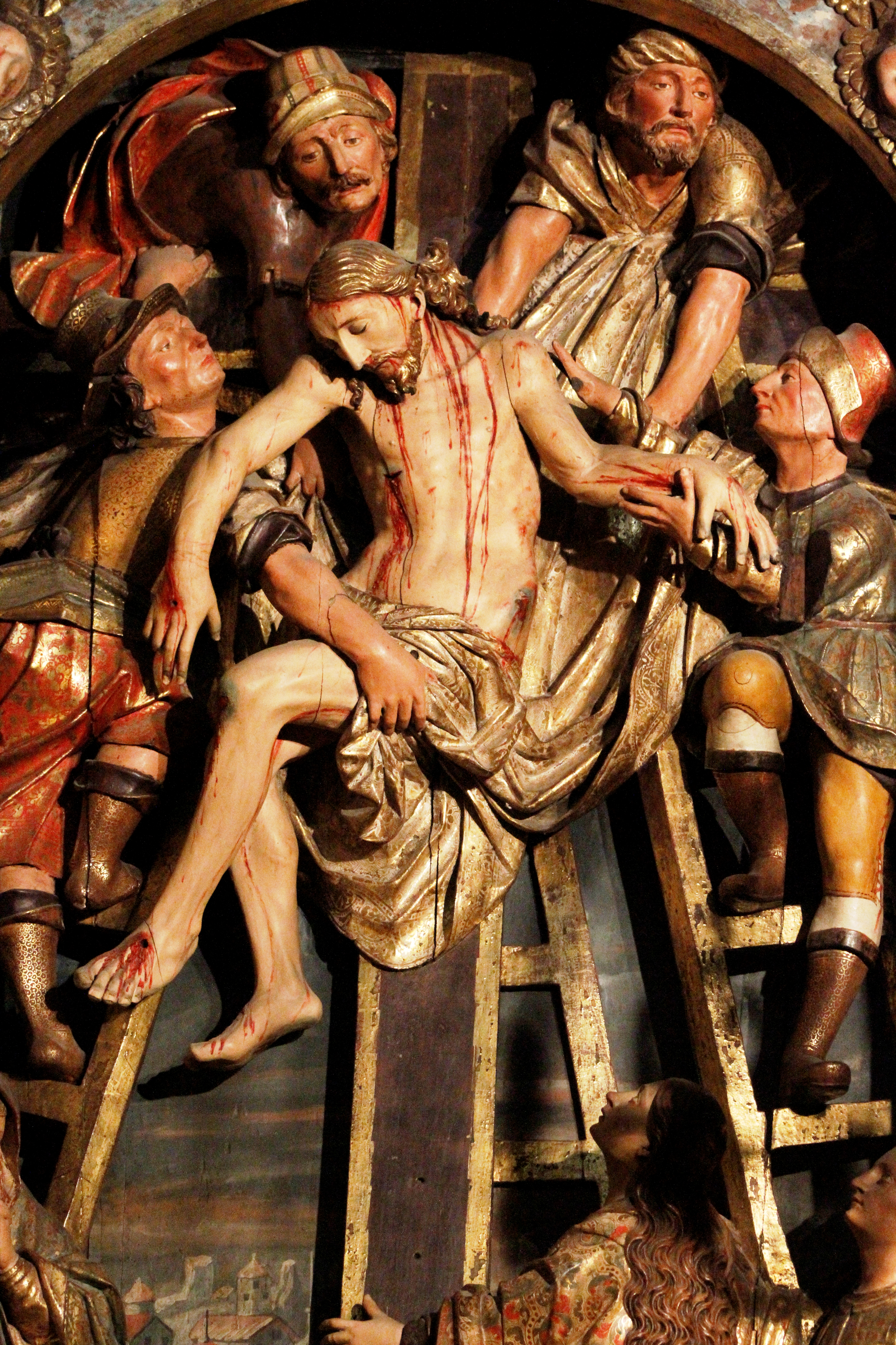 Deposição